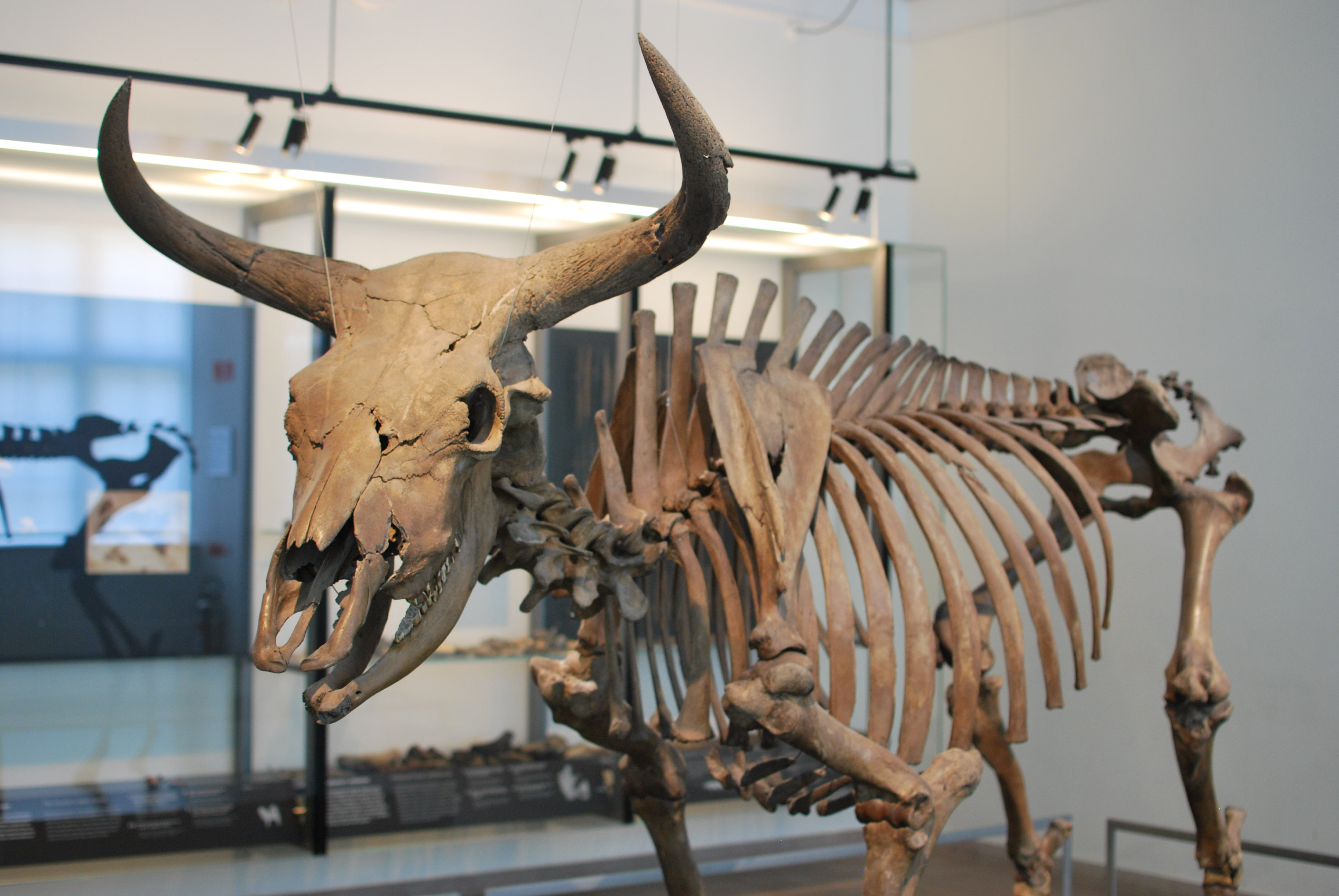 Fotografi af "Uroksen fra Vig". Fotografi taget på National Musseet, København.